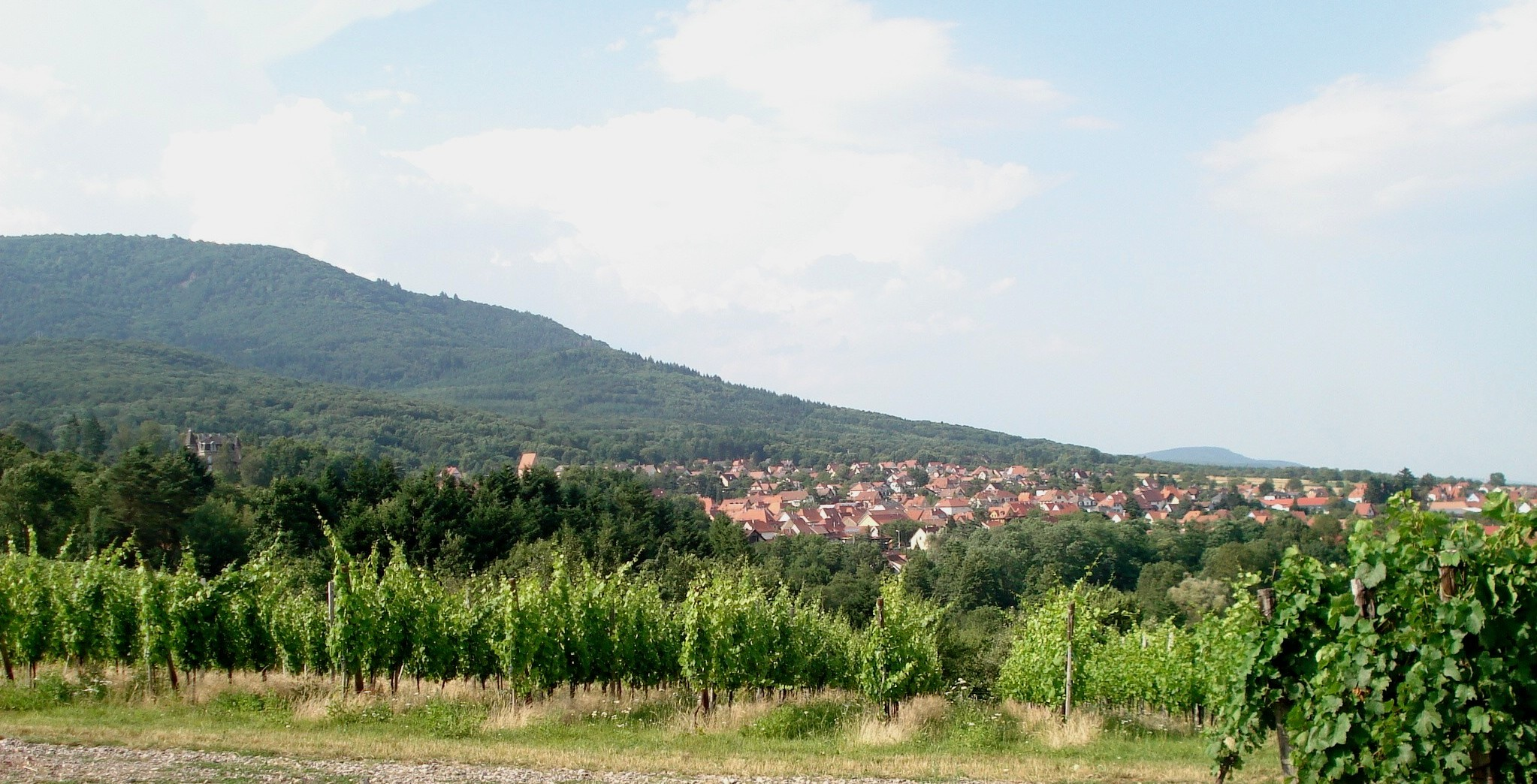 Vue de Wattwiller depuis le Nodelberg